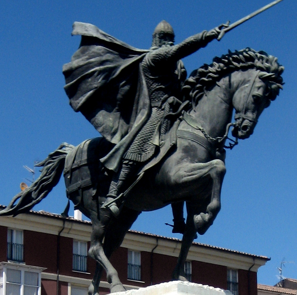 estatua de El Cid en la cabecera del puente de San Pablo, en Burgos